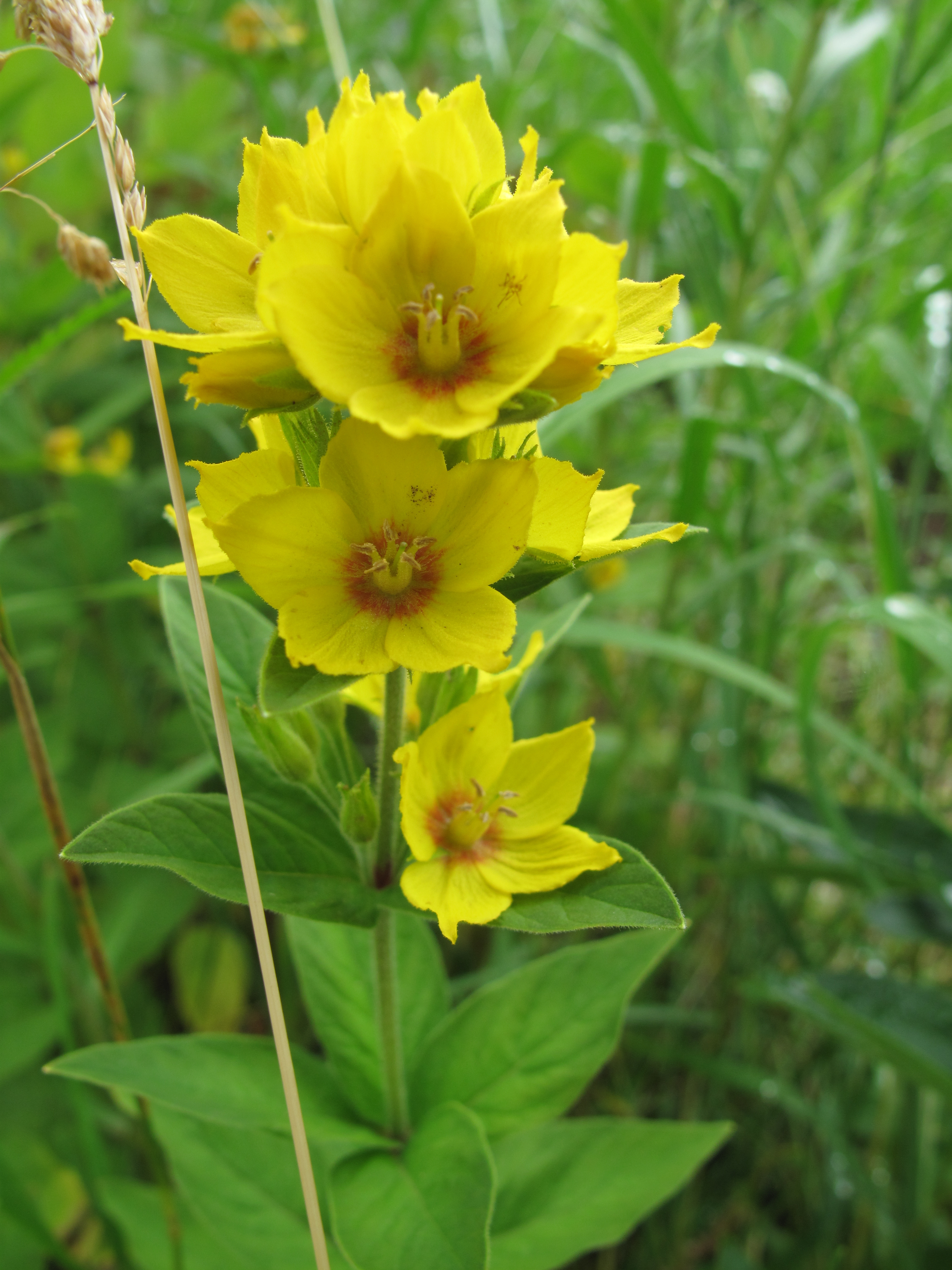 Fotky květů